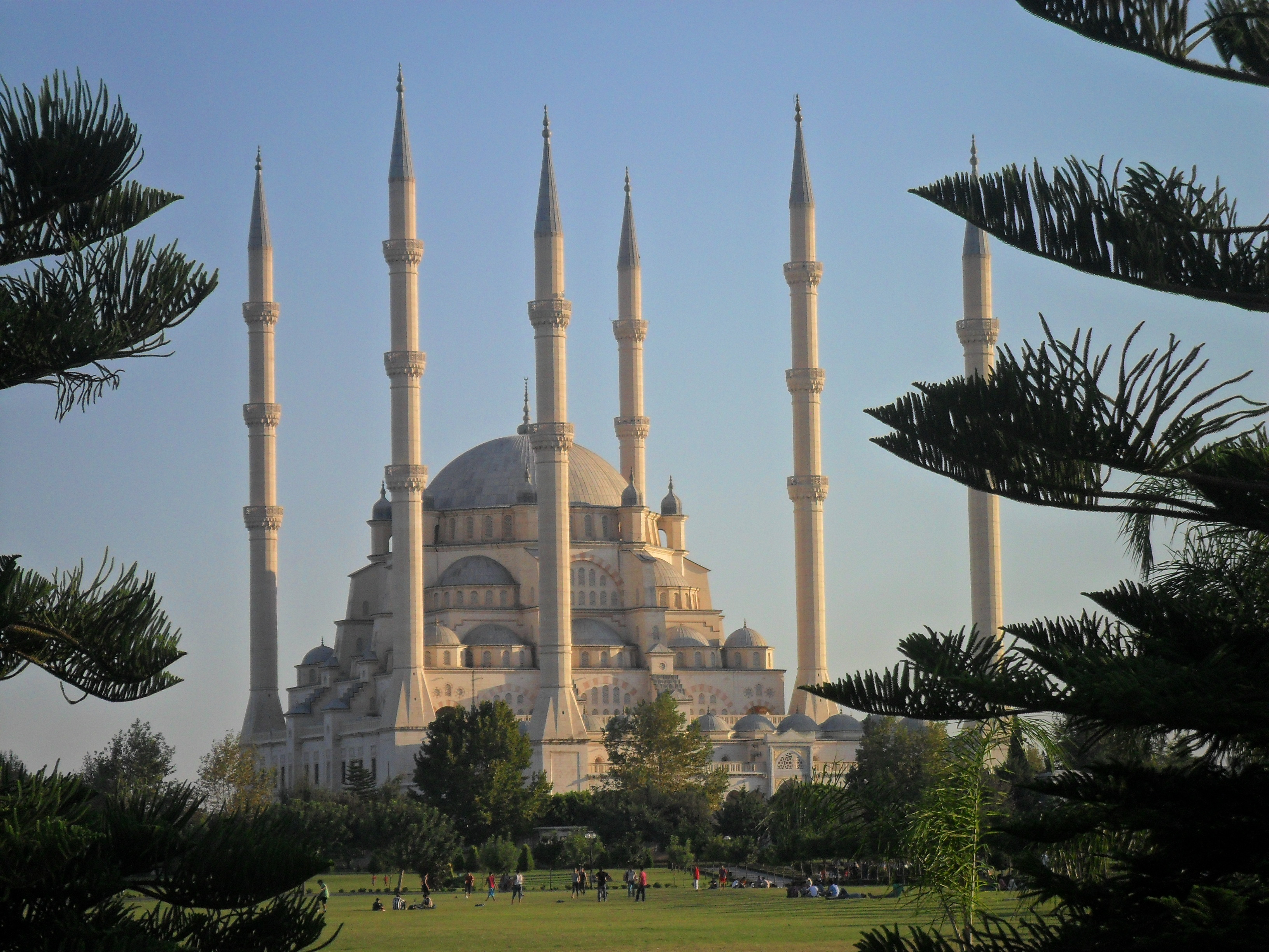 Sabancı Cami'nin Merkez Park'tan çekilmiş bir fotoğrafı.